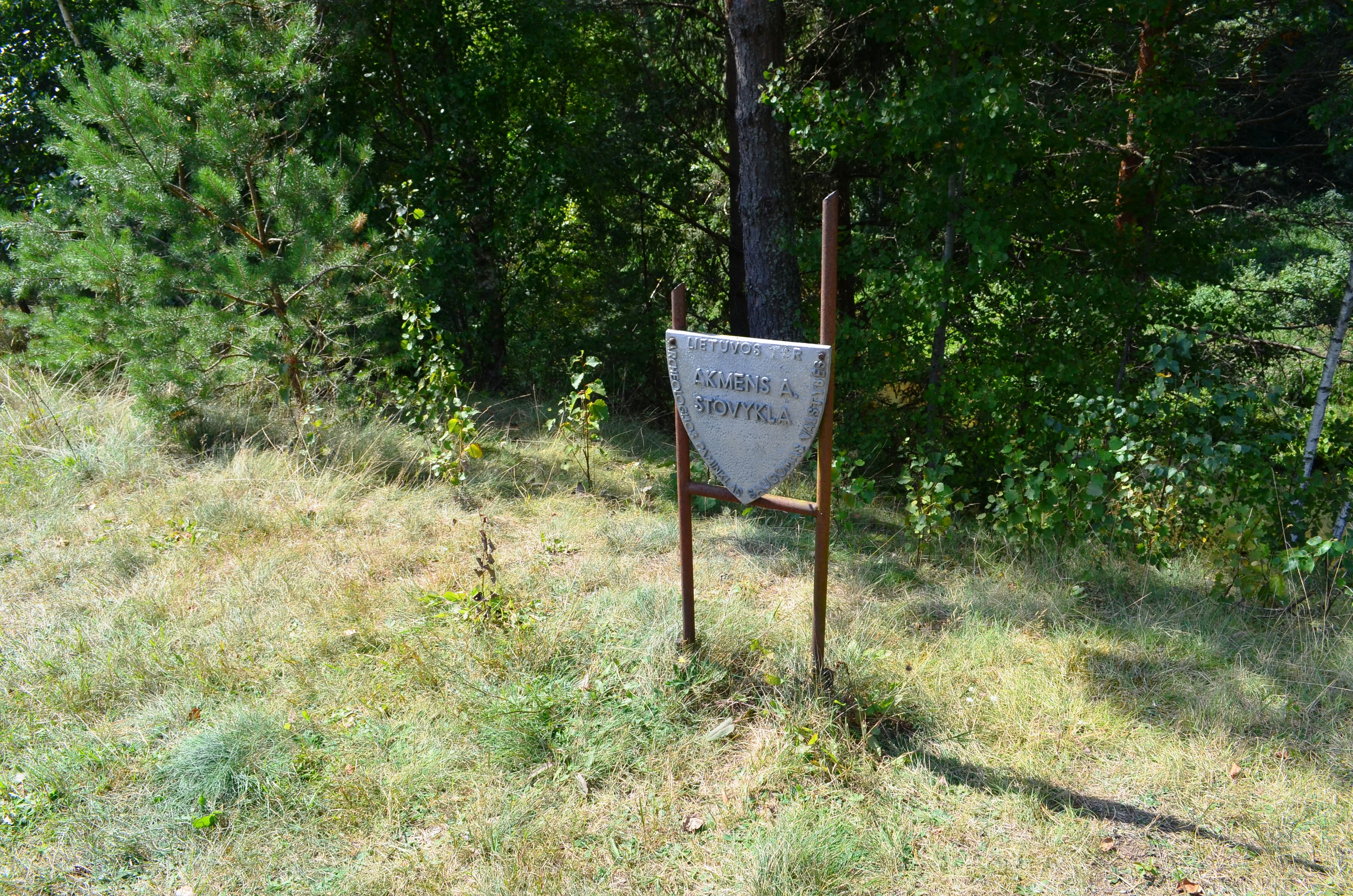 Akmens amžiaus stovykla greta Ūlos. Zervynos, Dzūkijos NP, Varėnos raj.